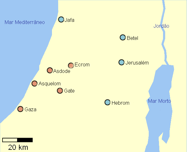 Mapa da Pentápolis Filisteia